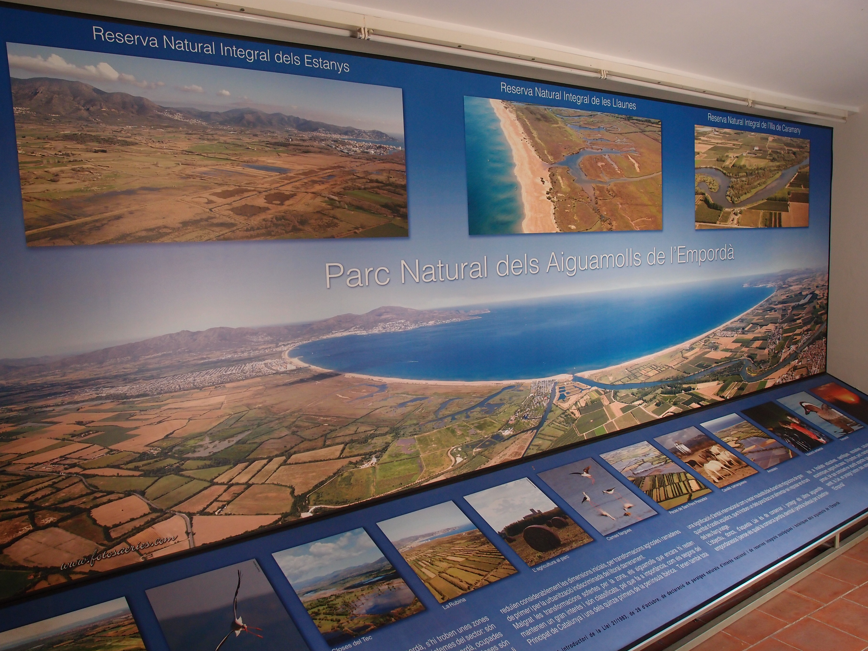 Naturpark Aiguamolls de l’Empordà - Wandbild hinter dem Zutrittsportal zu den Ausstellungsräumen Datum: 16.09.2011 Urheber: M. Pfeiffer alias Benutzer:Gordito1869 Quelle: Privates Fotoarchiv des Urhebers